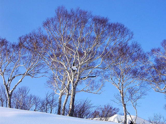 ダケカンバ （北海道倶知安町)Betula ermanii (kutchan-town, Hokkaido, JAPAN)